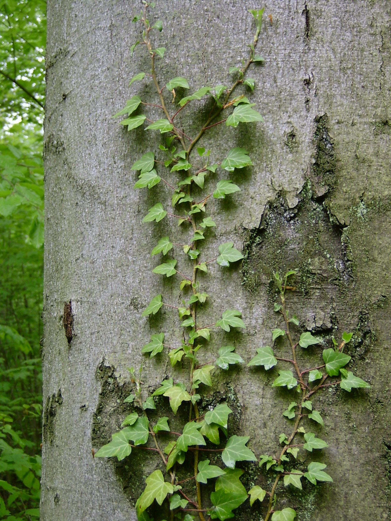 Puszcza Notecka - gmina Santok, powiat gorzowski, woj. lubuskie, Poland